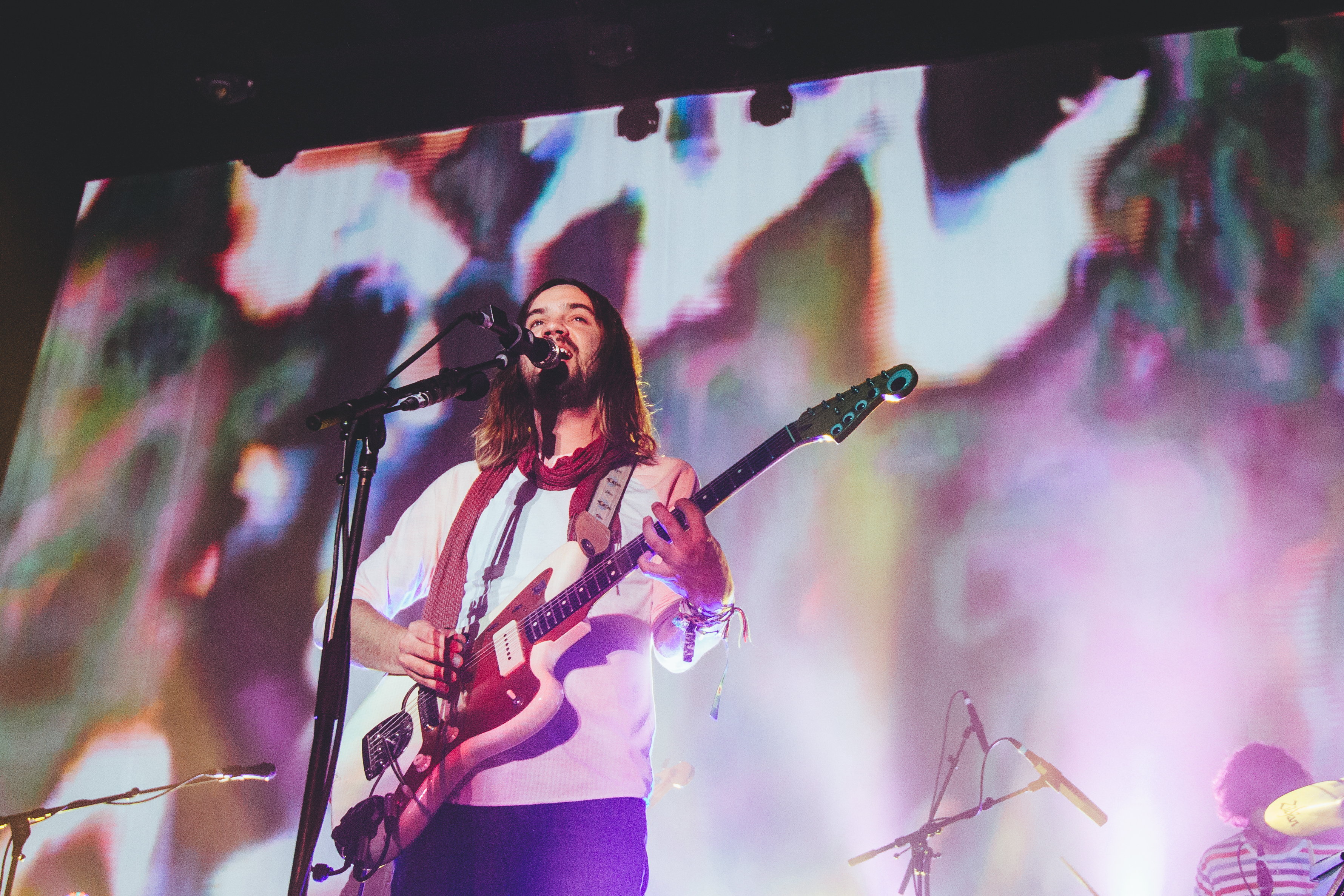 Tame_Impala-3801